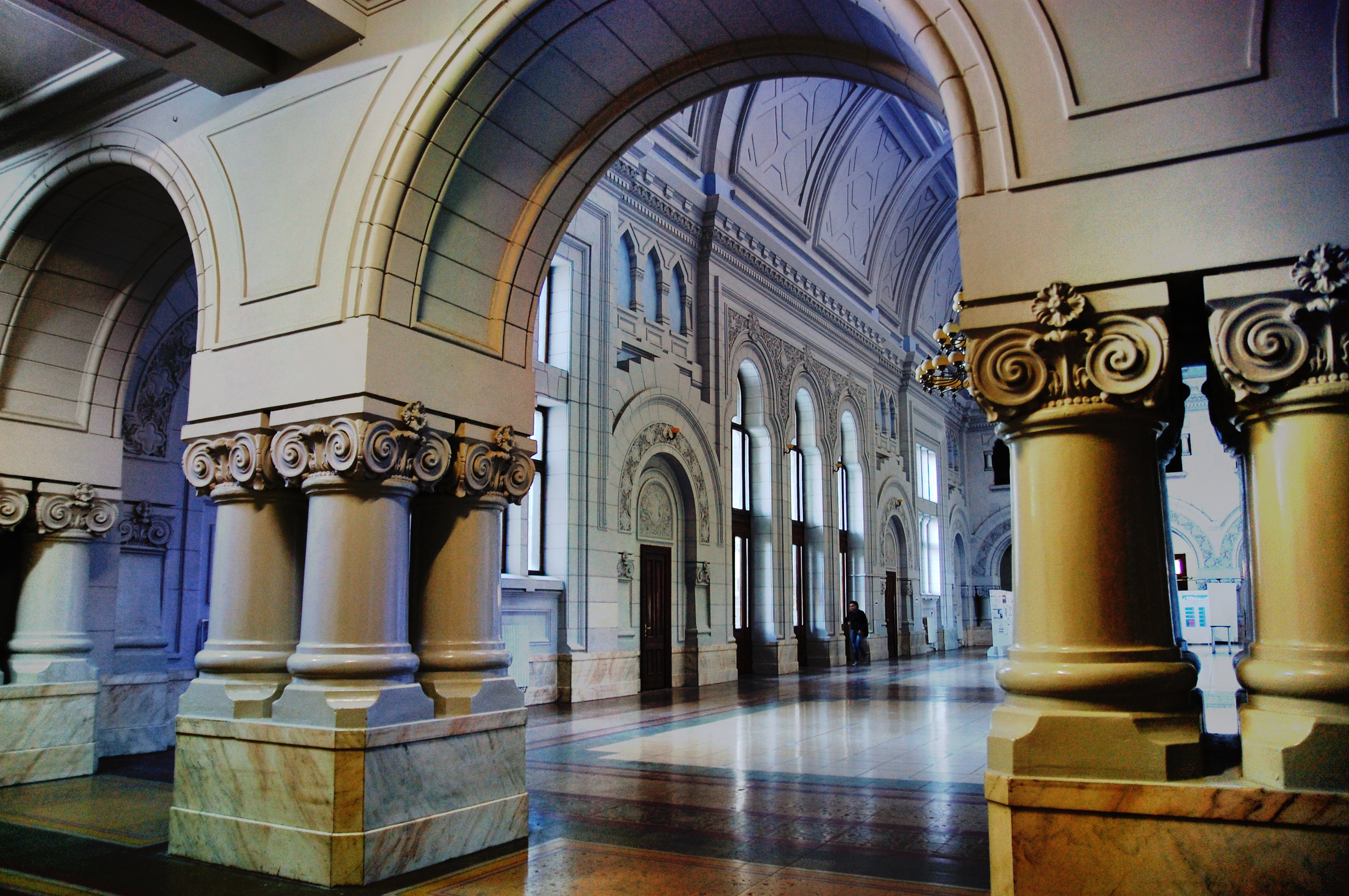 Univ1